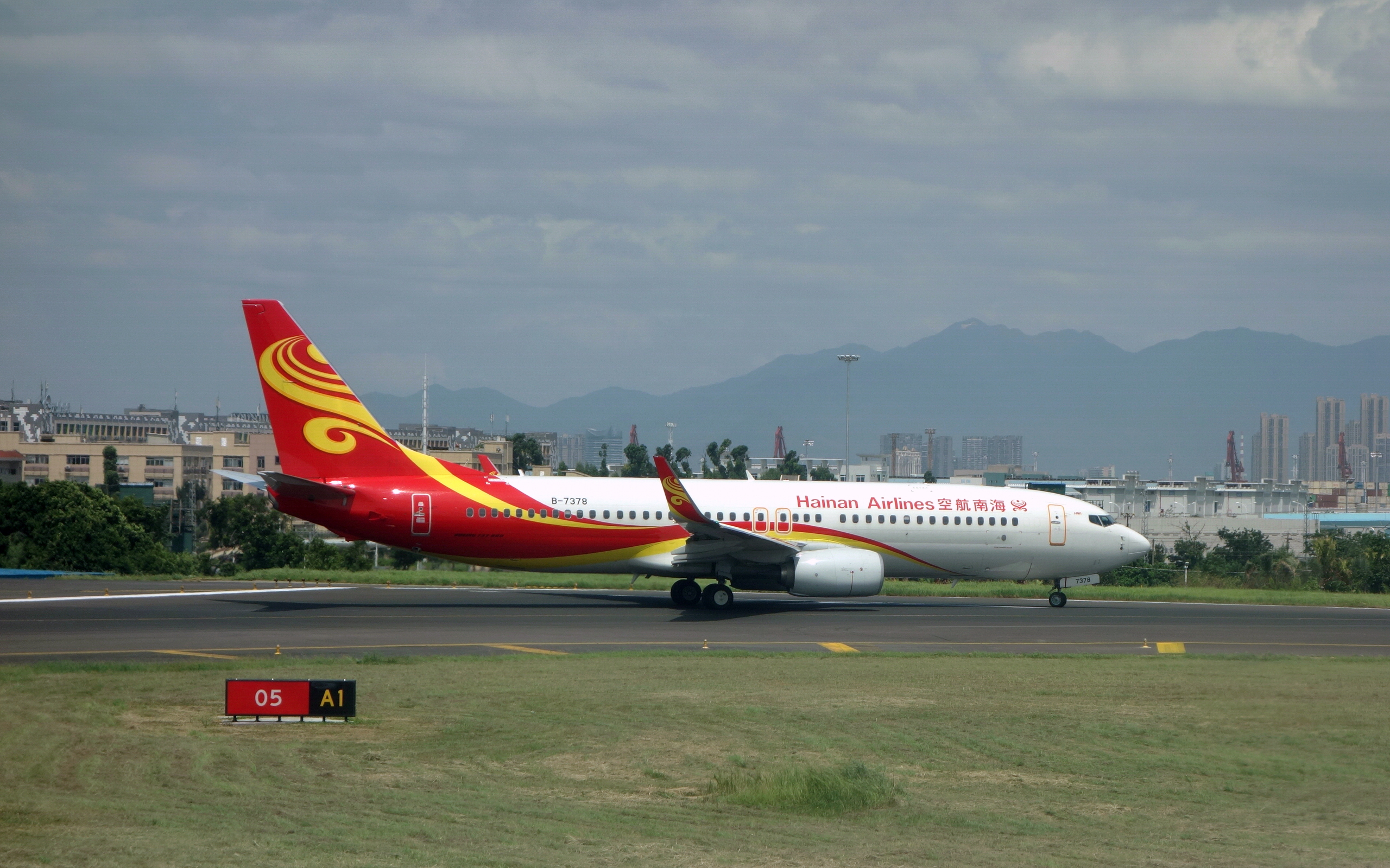 海南航空公司的波音B737-800(WL) (注册号B-7378) 客机在厦门高崎机场